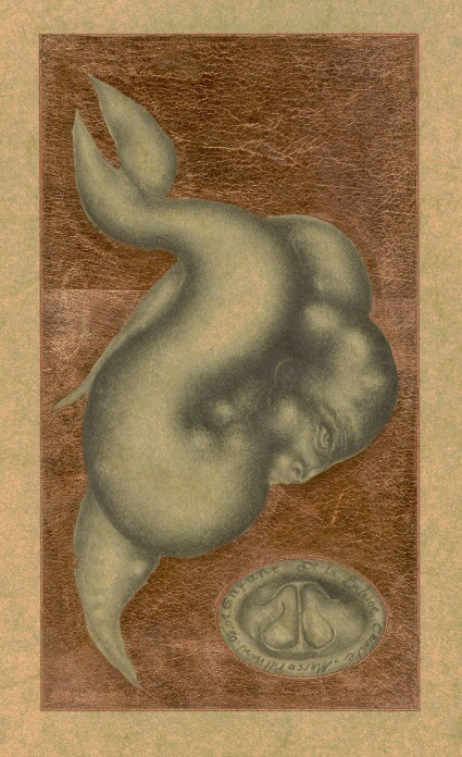 Format A4, dessin crayon sur fond à la feuille d'or, support papier